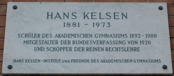 Gedenktafel für Hans Kelsen am Wiener Akademiscchen Gymnasium